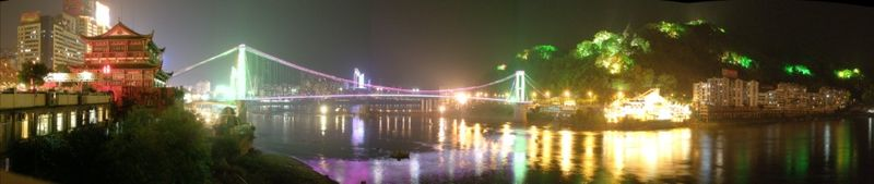 中文（中国大陆）: 南平夜景 1